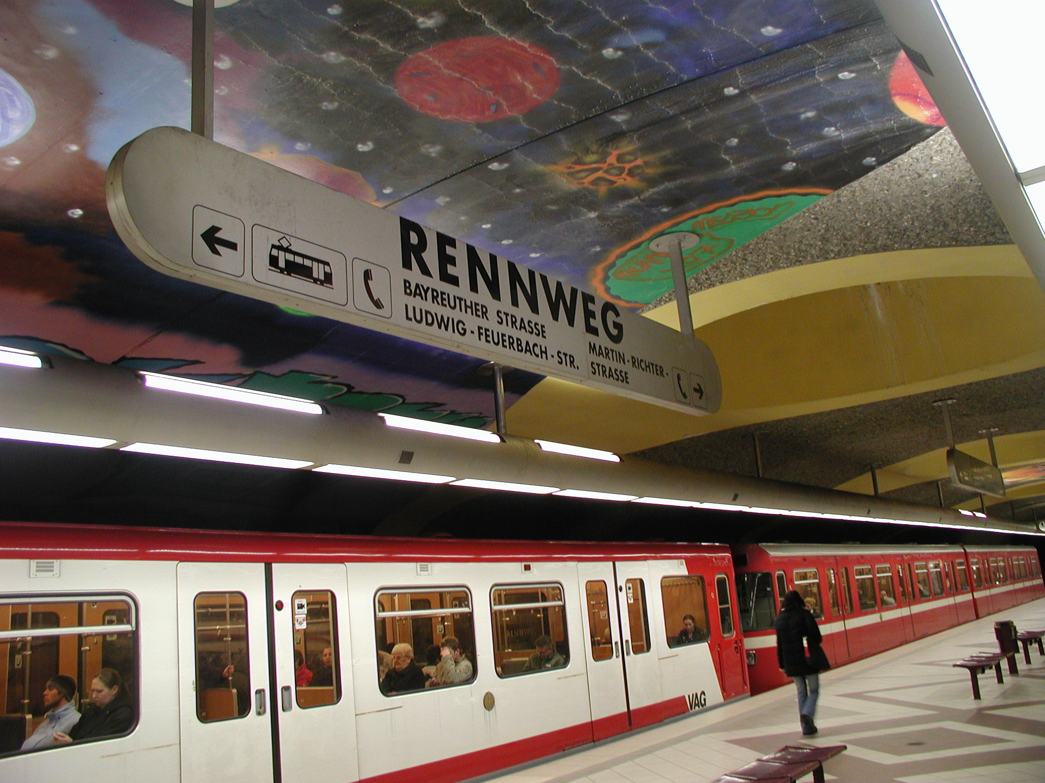 U-Bahnhof Nürnberg Rennweg